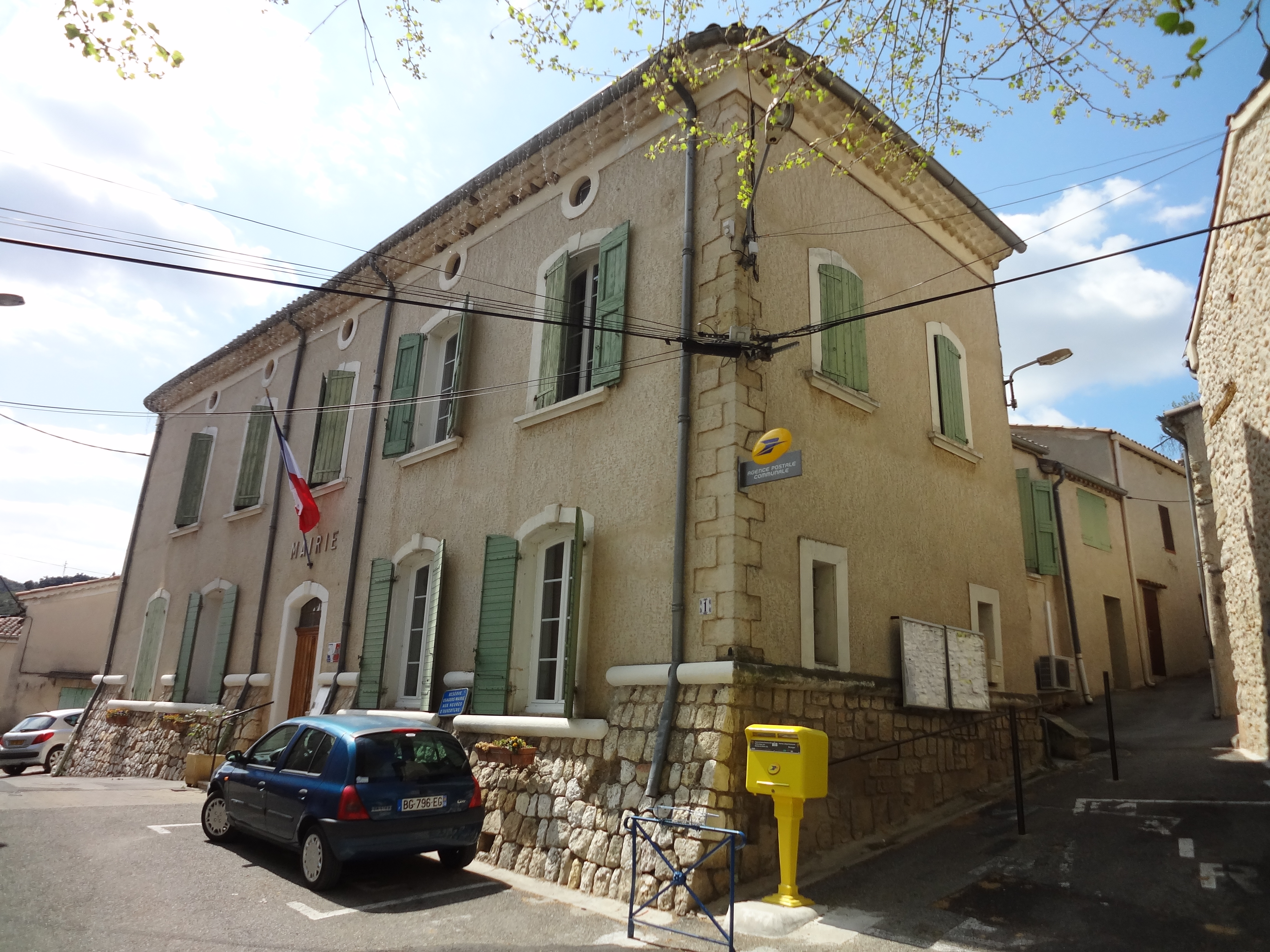 Mairie de Corbières, installée dans une maison bourgeoise du XIXe siècle